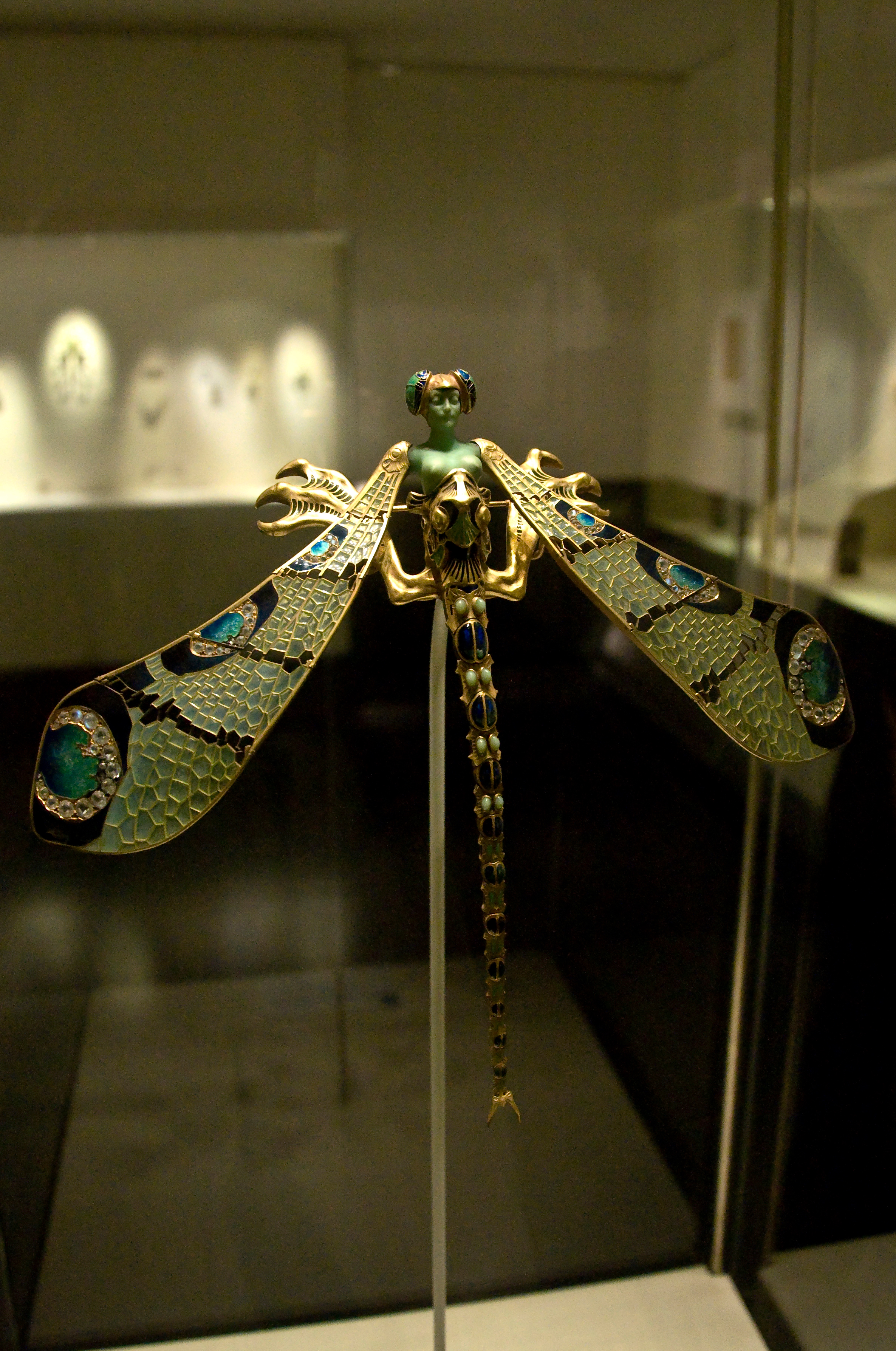 "Libelvrouw" van René Lalique in het museu Calouste Gulbenkian te Lissabon